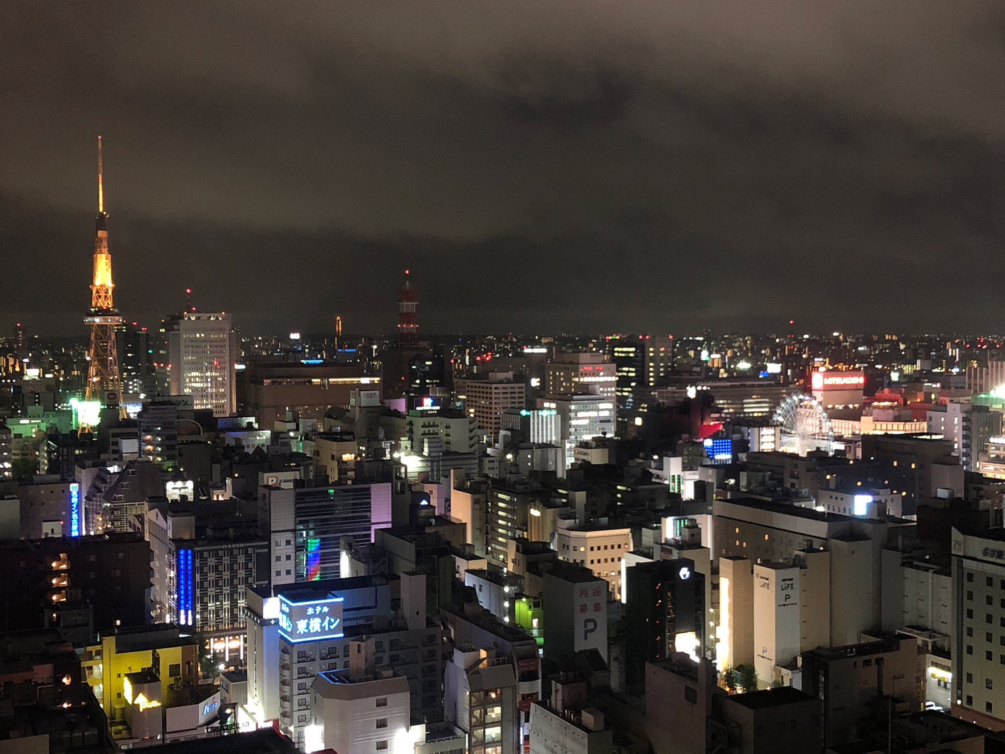 Sakae night